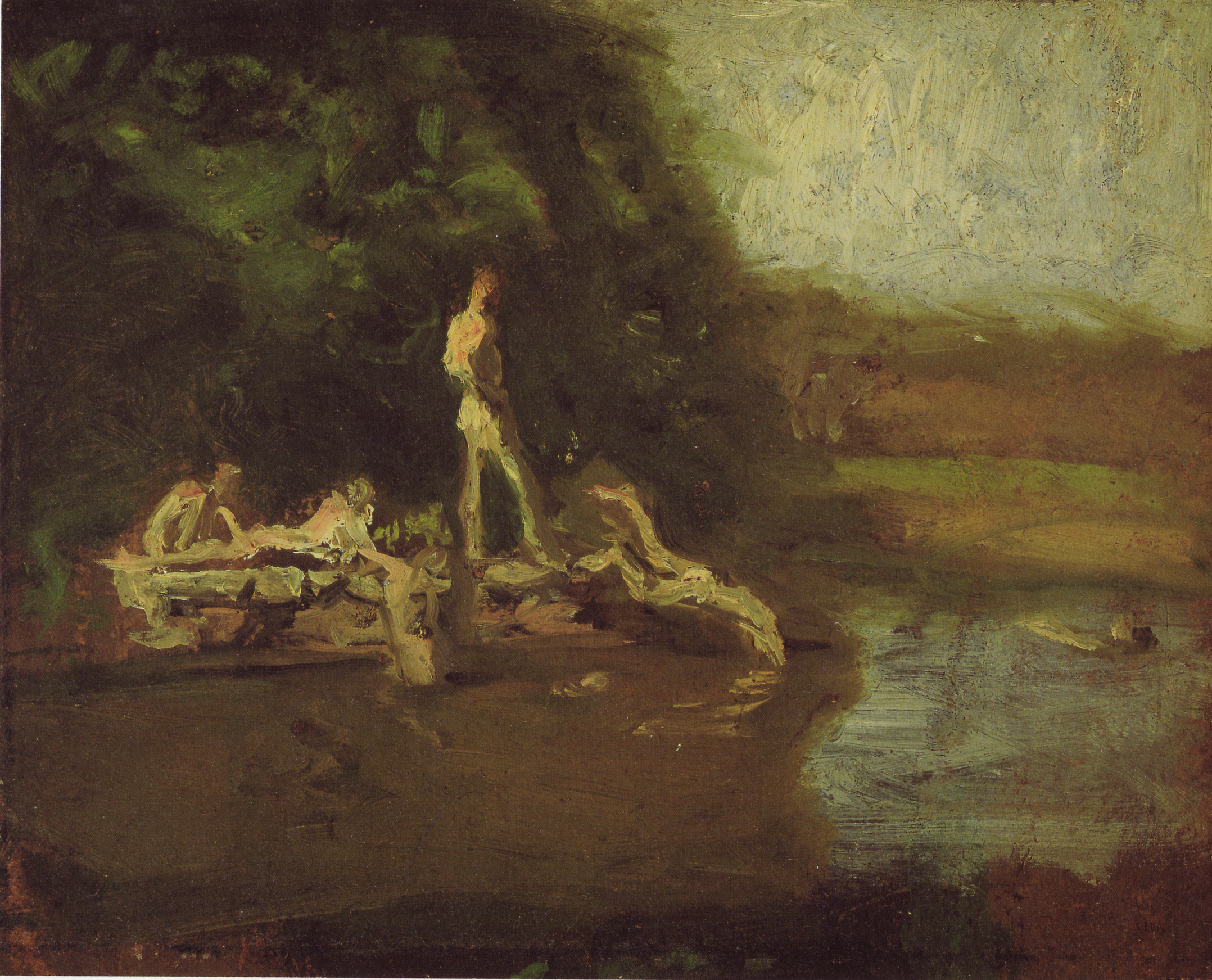 G-191